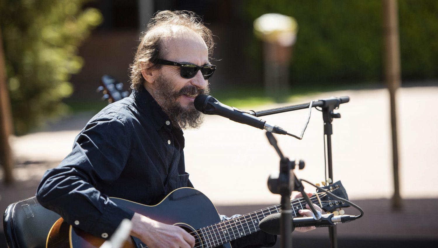 La primera mañana de las fiestas de San Isidro ha llenado de propuestas para toda la familia los principales escenarios de estas celebraciones, como el concierto de instrumentos de viento que ha tenido lugar en la plaza de Oriente, o el singular cuento que ha enseñado a niños, niñas y mayores en la Pradera de San Isidro como aliarse con algo tan misterioso como es el tiempo. Los amantes del baile han podido disfrutar en Las Vistillas con la clase de danzas madrileñas a cargo de las principales asociaciones folklóricas de la ciudad.